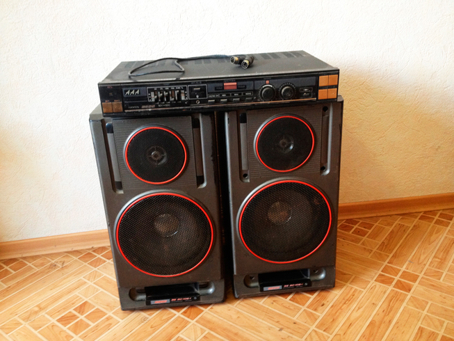 Усилитель Вега 122 с колонками